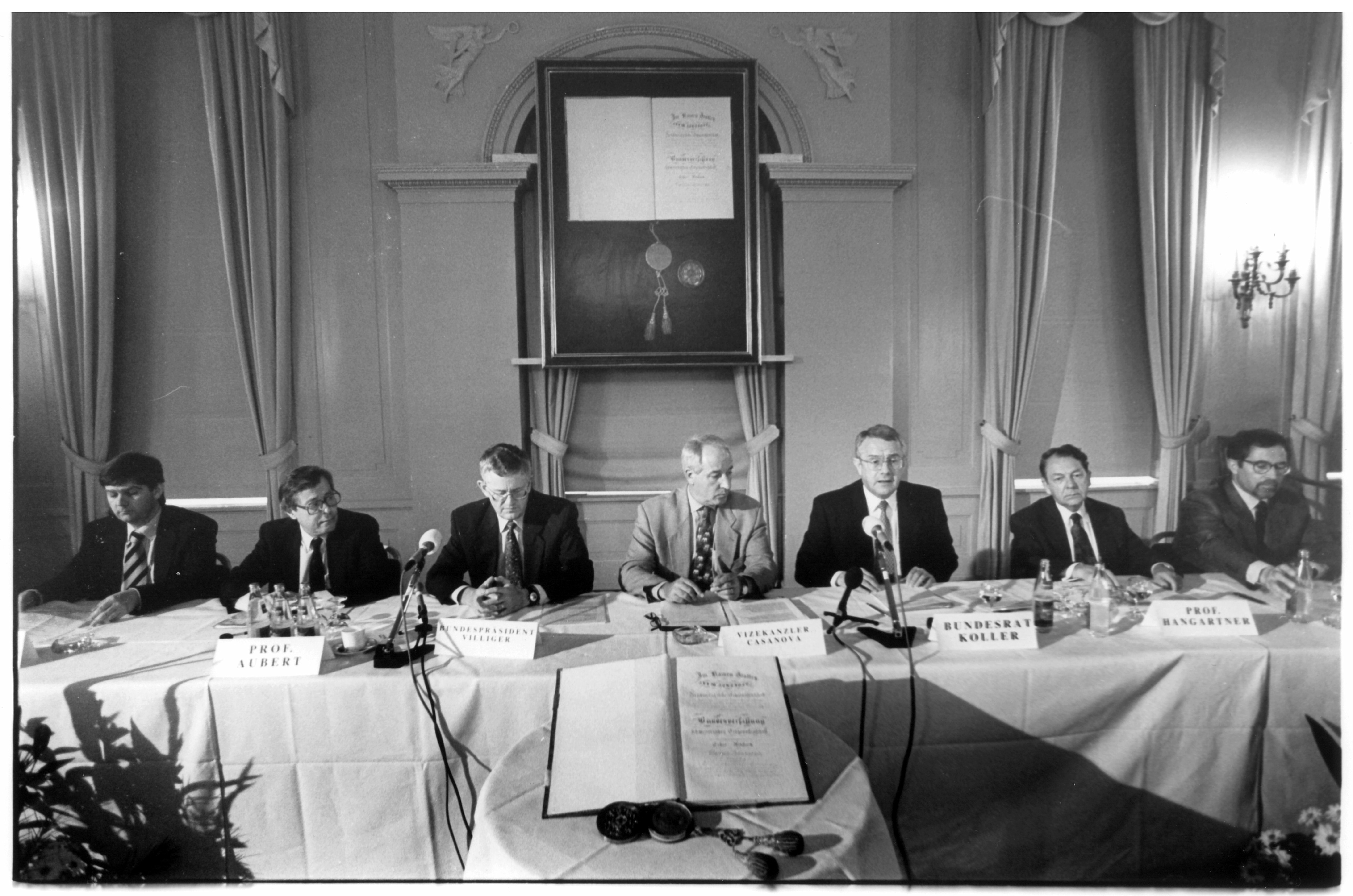 Medienkonferenz zur Vernehmlassung zur Reform der Schweizerischen Bundesverfassung (welche in der Verfassung von 1999 mündete). Von links: Walter Kälin, Jean-François Aubert, Kaspar Villiger, Achille Casanova, Arnold Koller, Yvo Hangartner, Heinrich Koller. Medienmitteilung